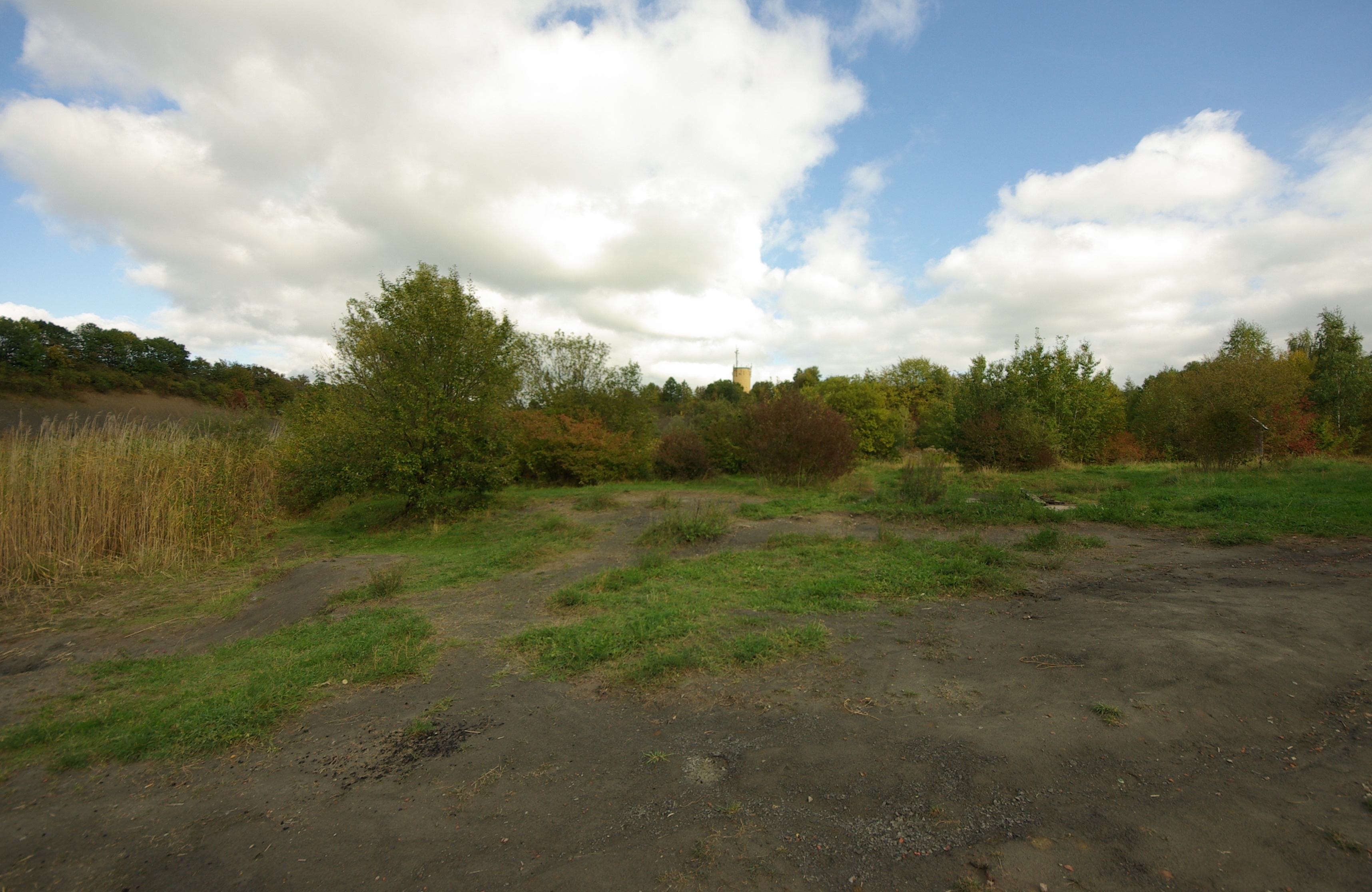 Ehemalige Tongrube bei Marloffstein